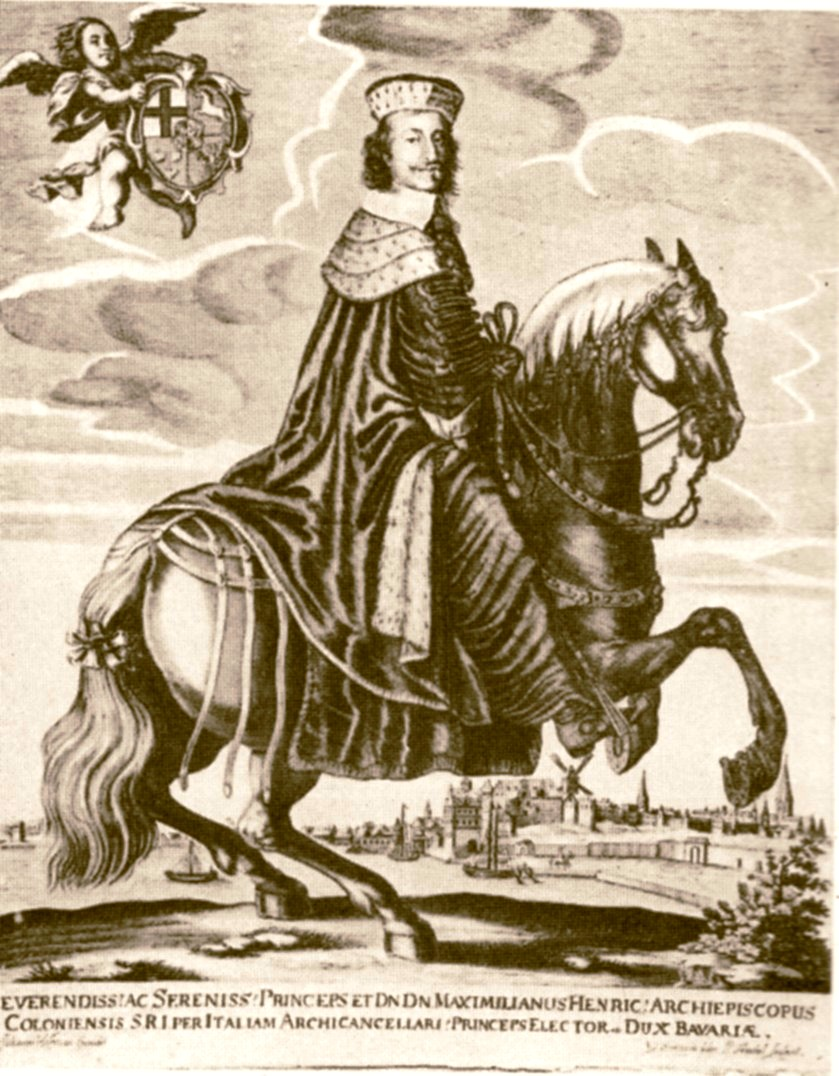 Kurfürst und Erzbischof von Köln Maximilian Heinrich von Bayern zu Pferd vor der Stadt Bonn